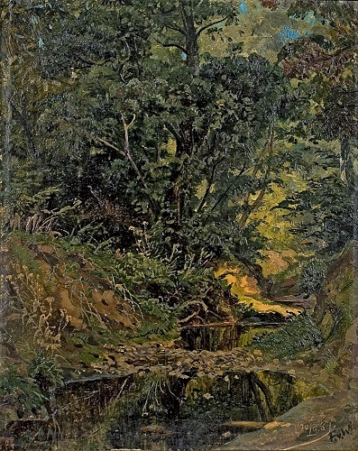 Bei Endenich. Öl auf Karton, 31,5 x 26 cm, bezeichnet, datiert und signiert »Endenich 30/9.8 F. v. W.«